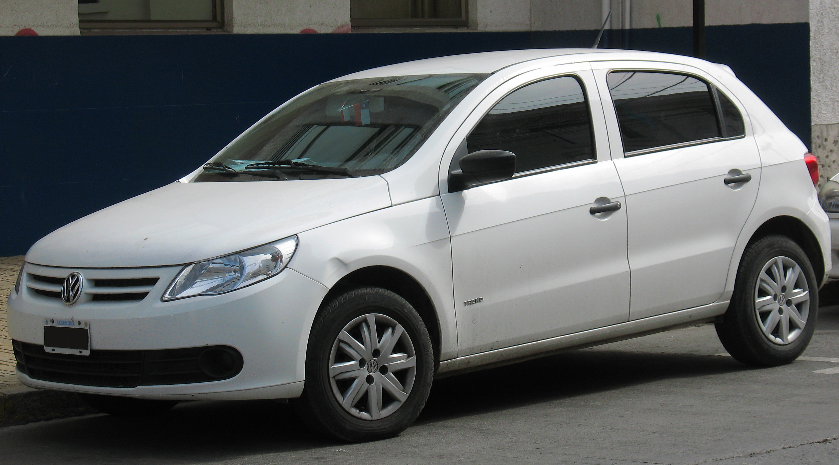 Volkswagen Gol 1.6 Trend 2011